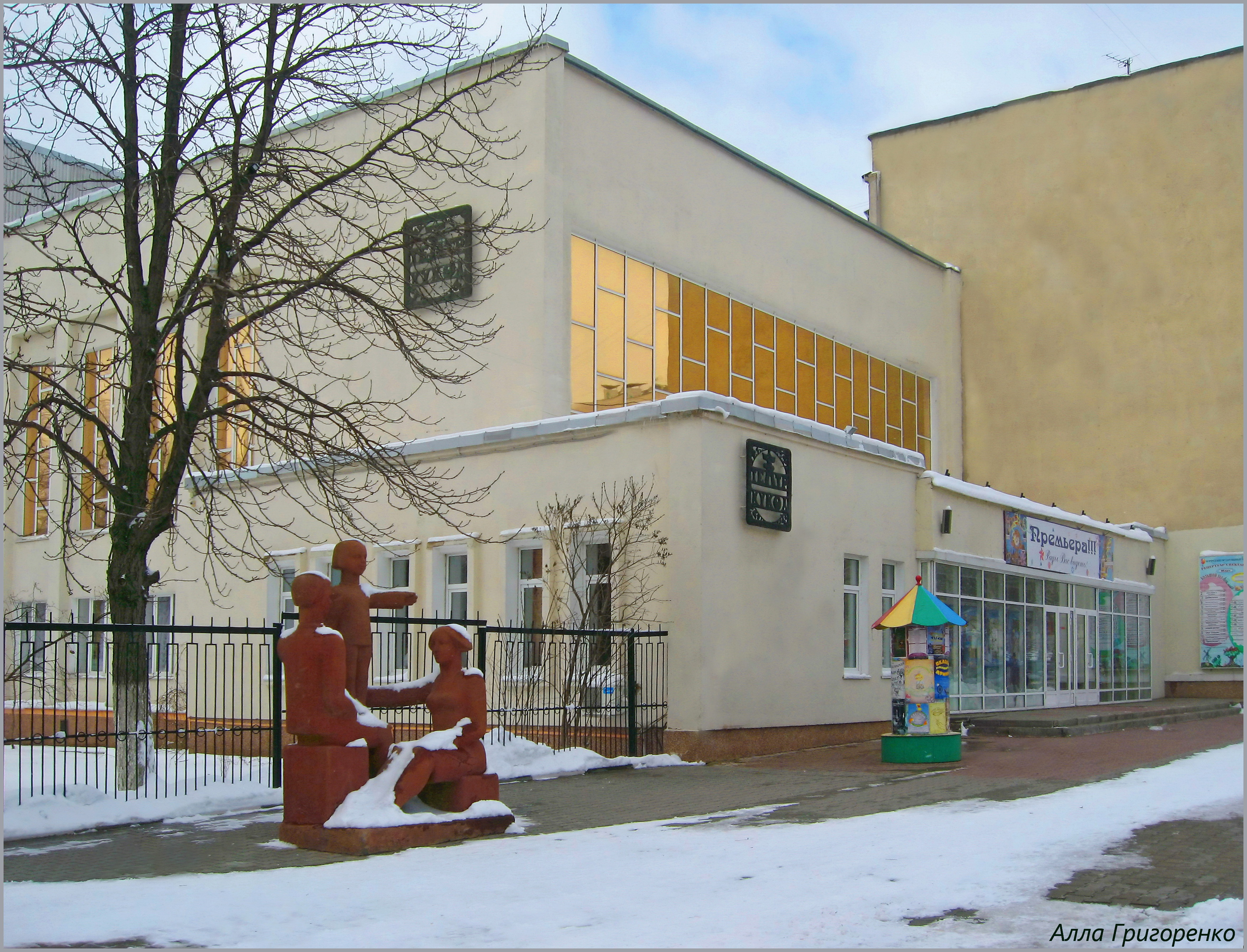 Здание Белгородского театра кукол